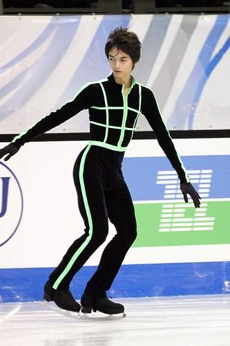 Ryuju Hino на финале Гран-при среди юниоров сезона 2011-2012